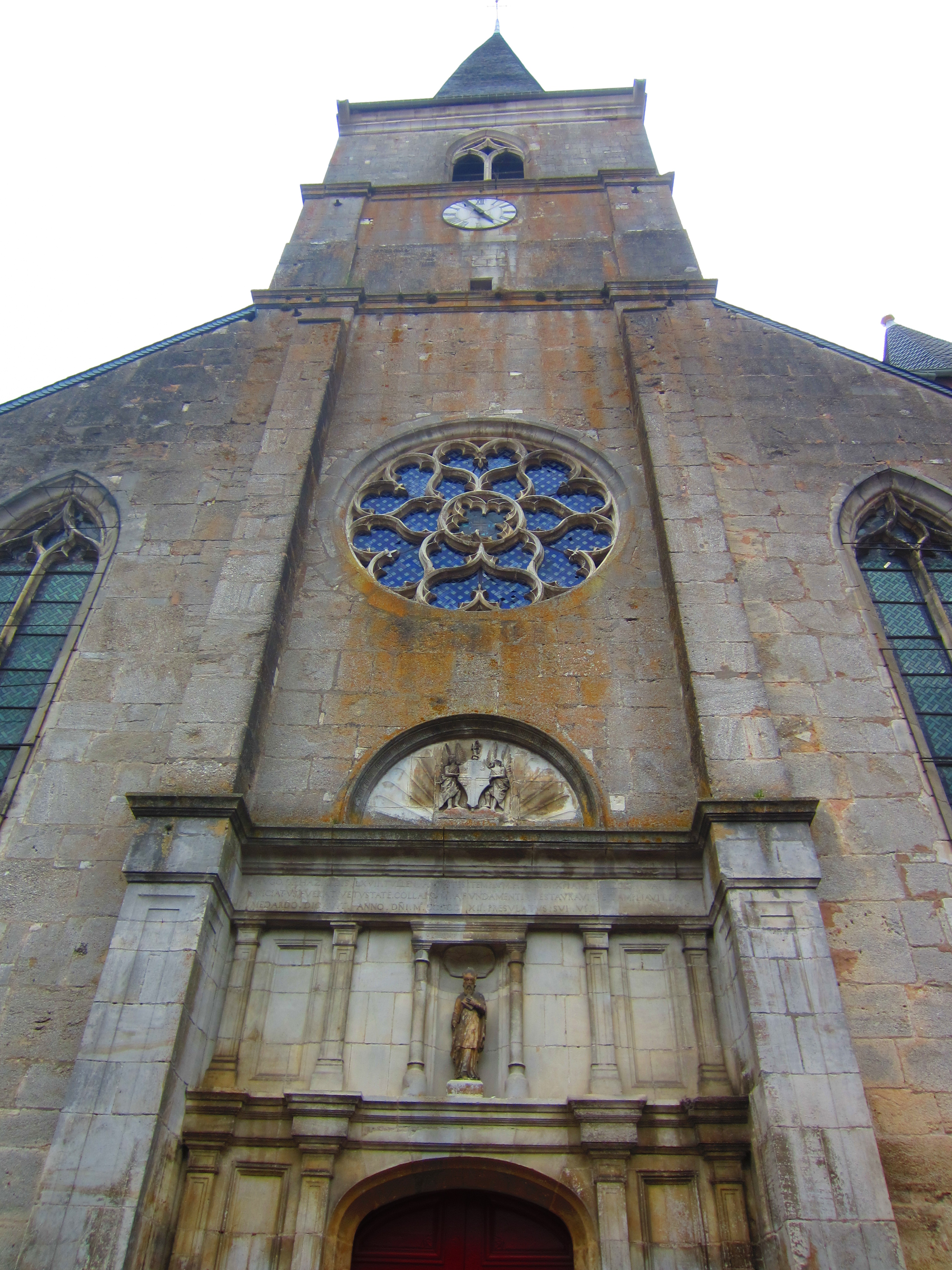 Eglise Blenod Toul (5)